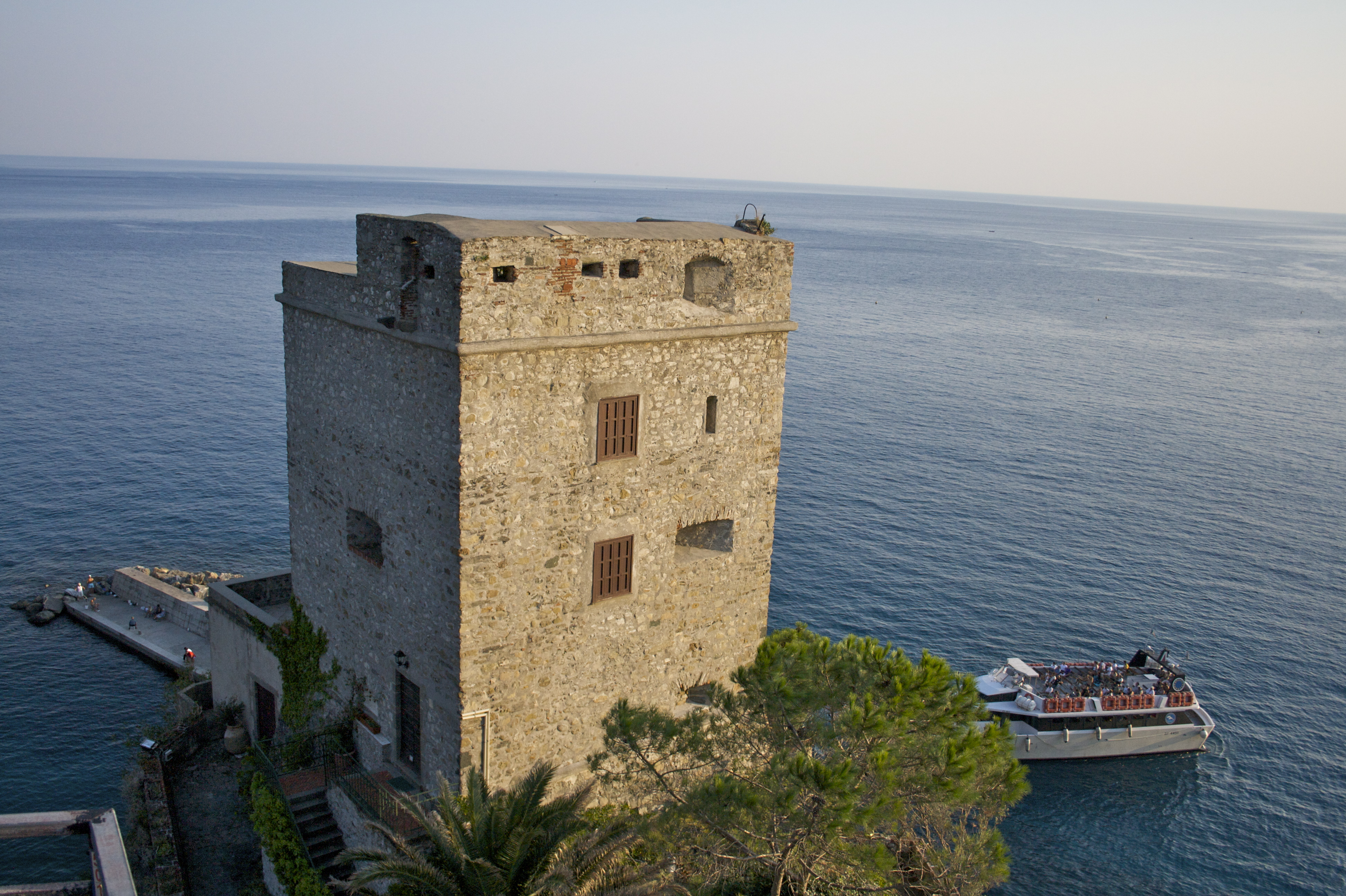 Torre Aurora, Monterosso al Mare, Liguria, Italia